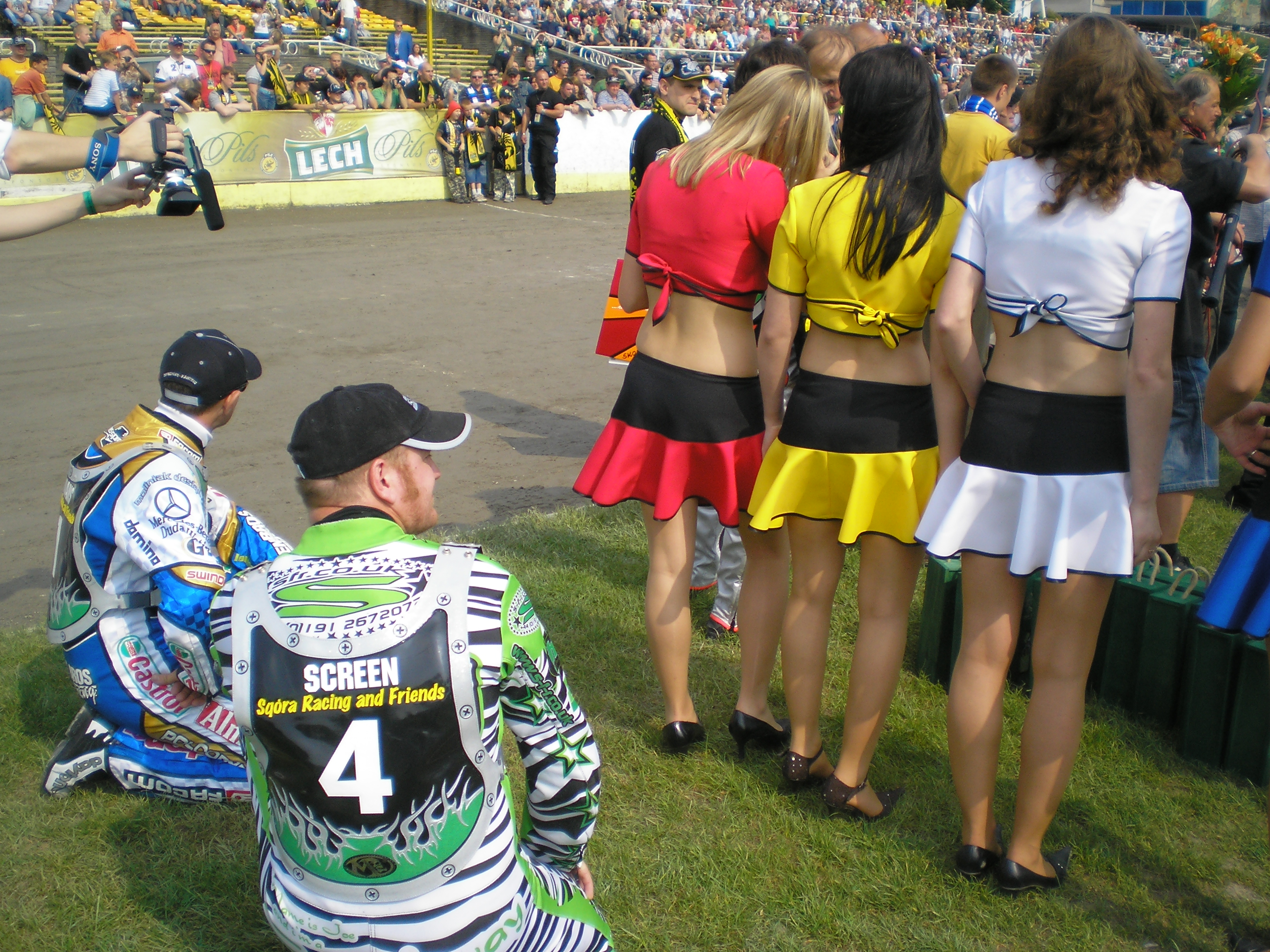 Adams & Screen zabezpieczają "tyły" przed turniejem 15-lecia startów Adama Skórnickiego